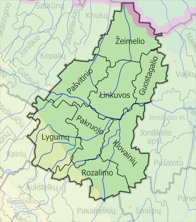 Padaryta iš :image:LietuvosSeniunijos.png